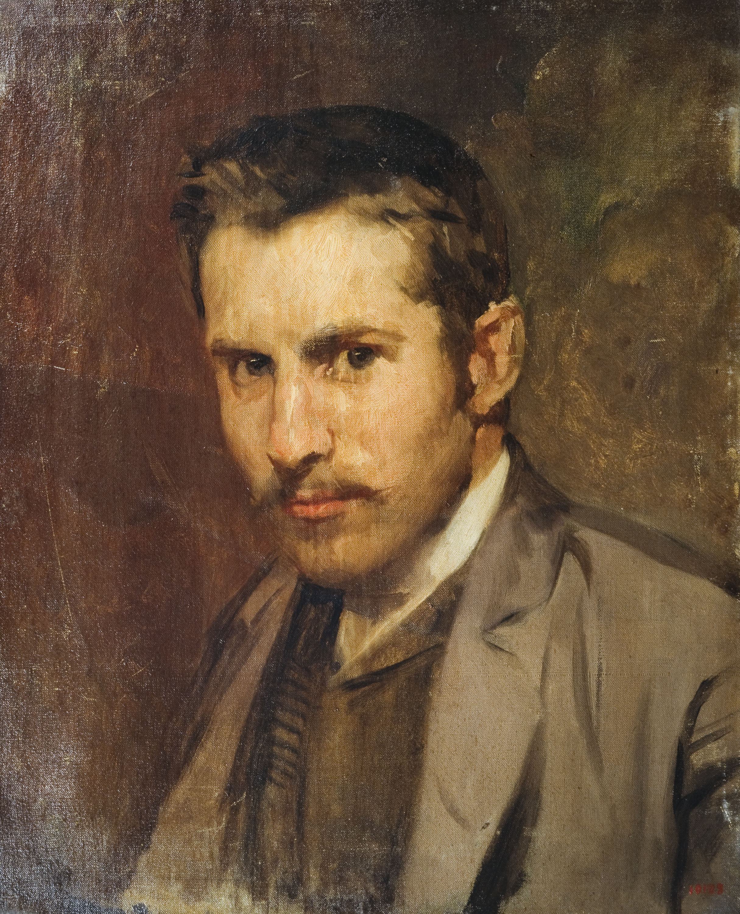 Retrato del pintor Sebastià Junyent, óleo sobre lienzo, 42,5 x 34 cm. Barcelona, Museu Nacional d'Art de Catalunya